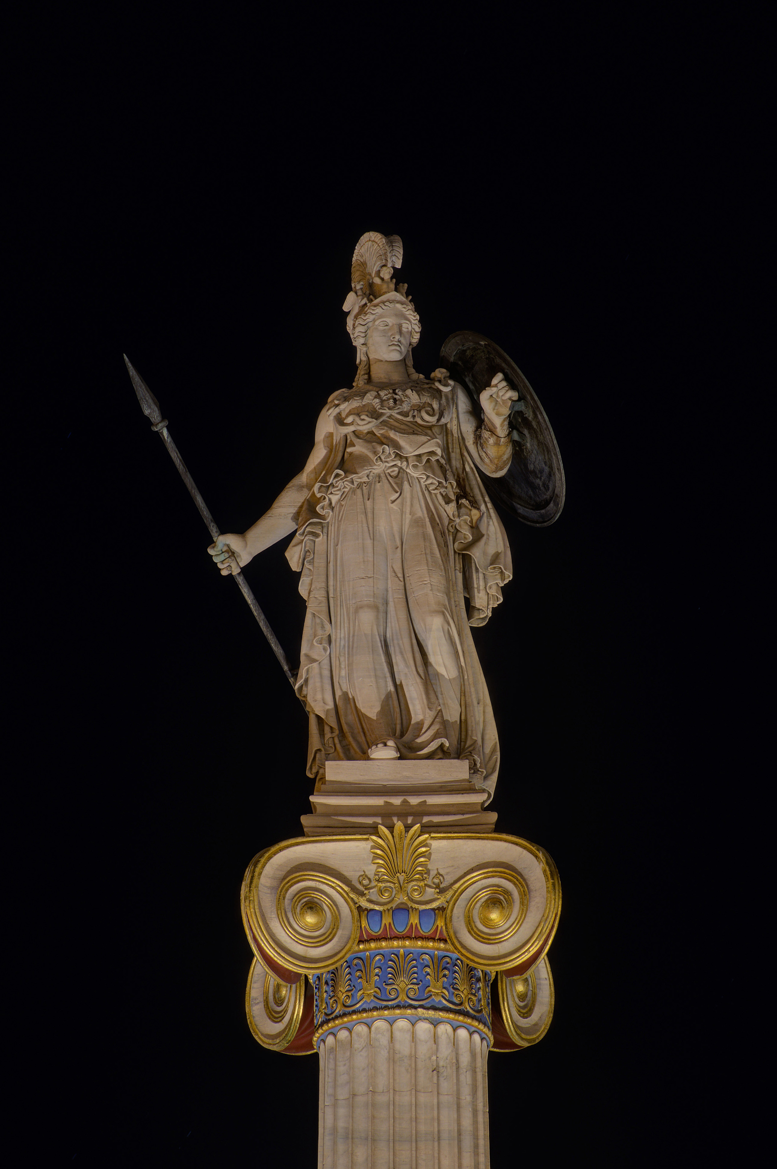 The marble statue of goddess Athena on top of a pillar, next to the mansion of the Academy of Athens. (